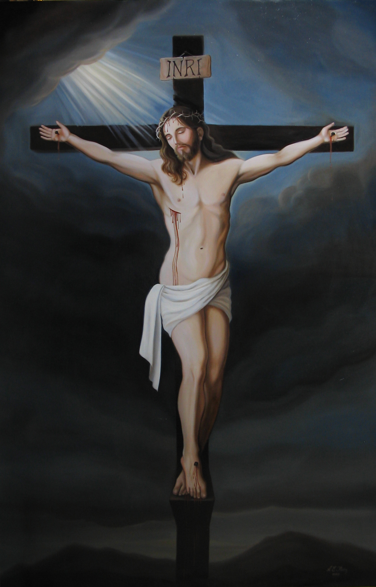 Albert Edwin Flury: "Crocifissione", 2007, olio su tela cm. 130x220. Legnano, chiesa del Santissimo Redentore.